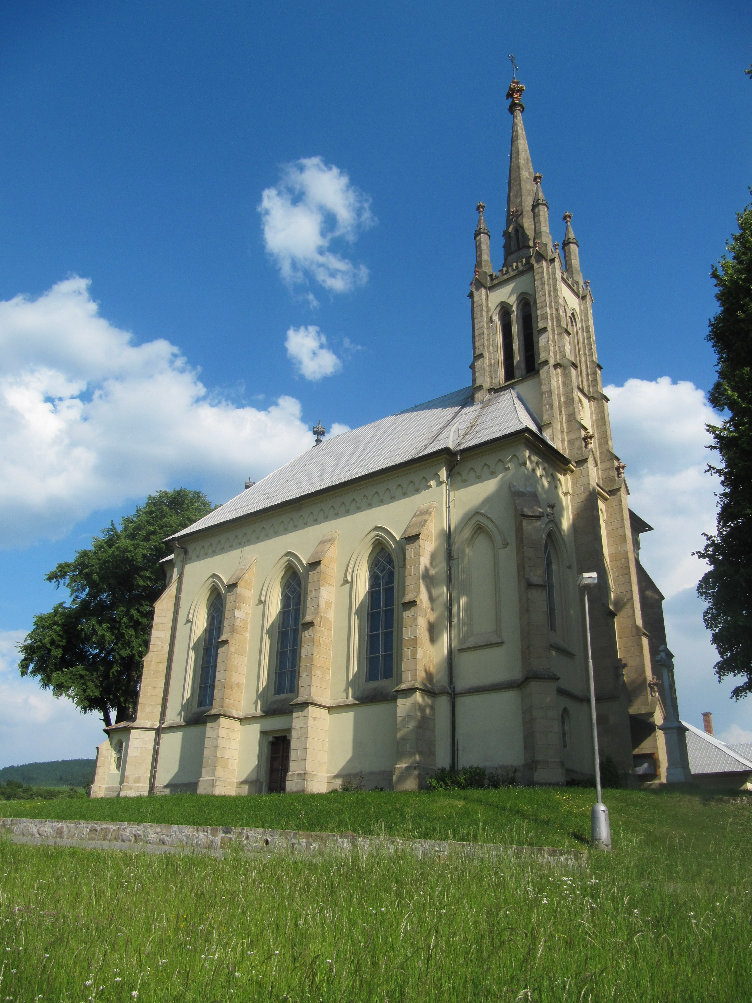 Bratřejov